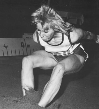 Factual corrections and alternative descriptions are encouraged separately from the original description. Additionally errors can be reported at this page to inform the Bundesarchiv. Original historic description: Bärbel Löhnert Zentralbild Wendorf Sche-Ho 19.2.1967 Berlin: Deutsche Leichtathletik-Hallenmeisterschaften am 19.2.1967. Deutsche Meisterin im Weitsprung wurde mit einer Siegerweite von 6,28 m Bärbel Löhnert (SC Frankfurt) .